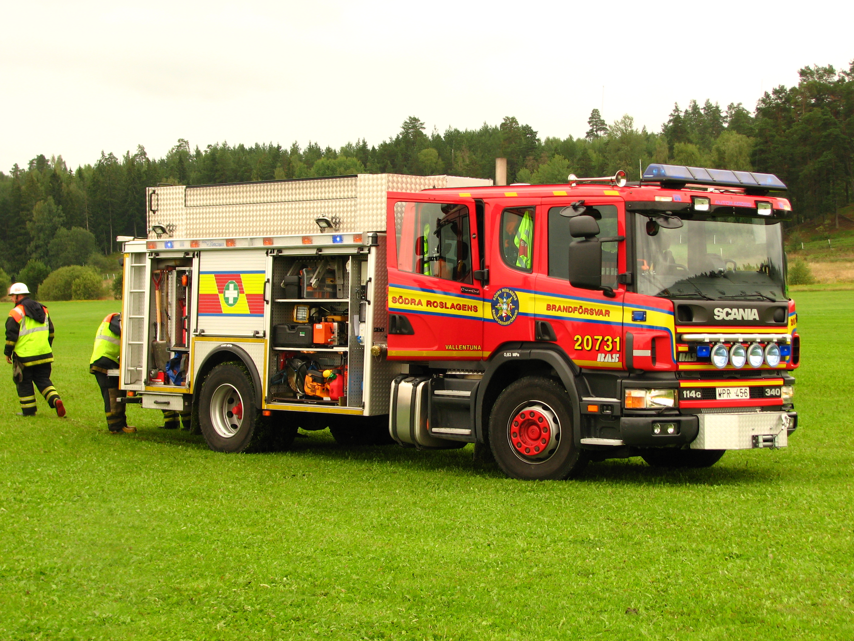 A Scania 114G 340 fire truck.